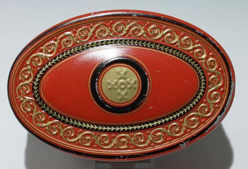 Keksdose aus Zinn von XOX, 1920er Jahre